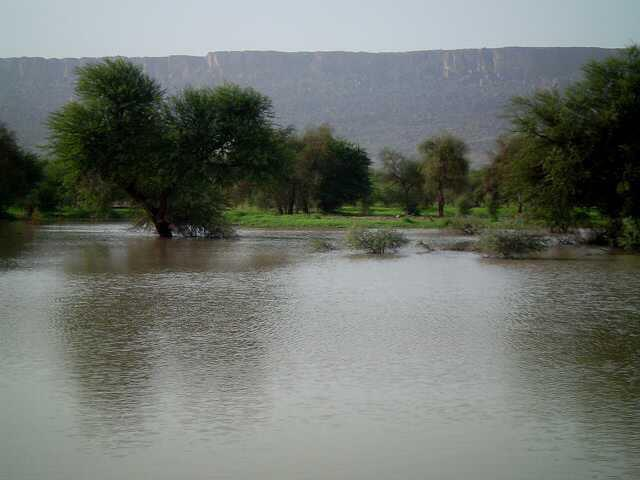 Akulaik Algrd